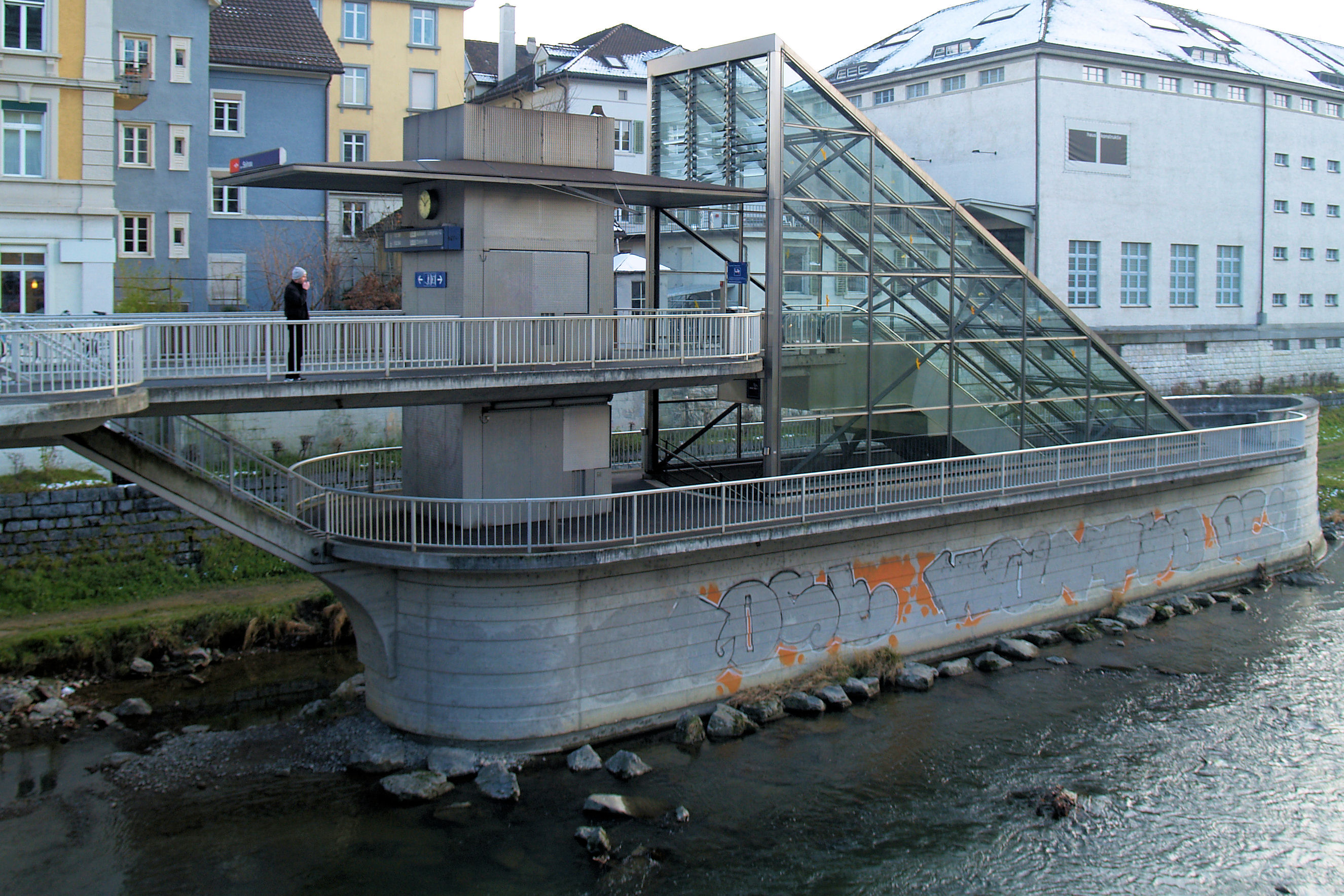 Oberirdischer Teil der Bahnhofes Zürich Selnau